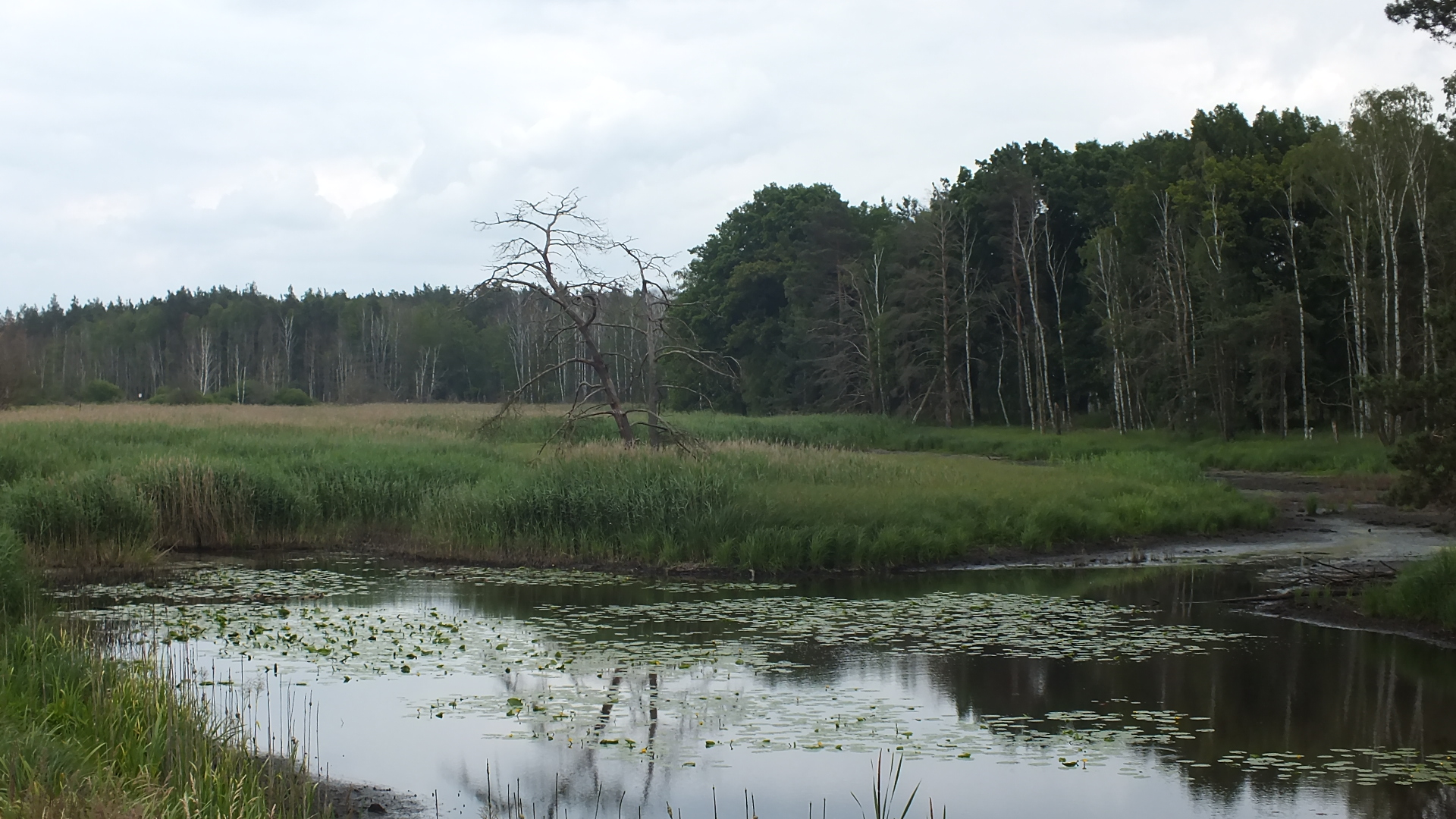 Naturschutzgebiet Alte Elster und Rohrbornwiesen